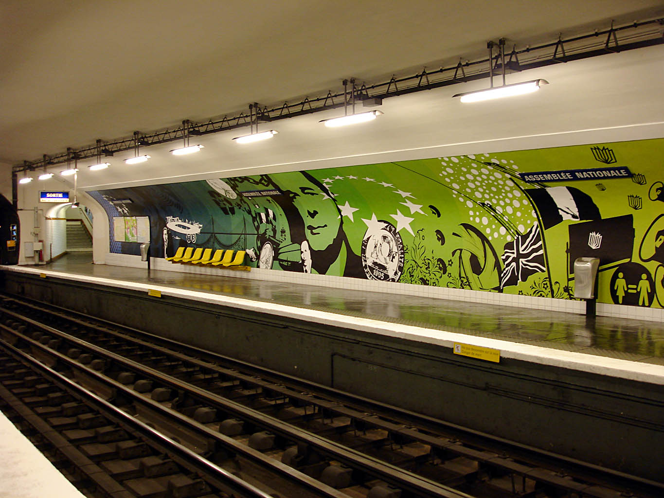 Station Assemblée nationale, de la ligne 12 du métro de Paris, France.